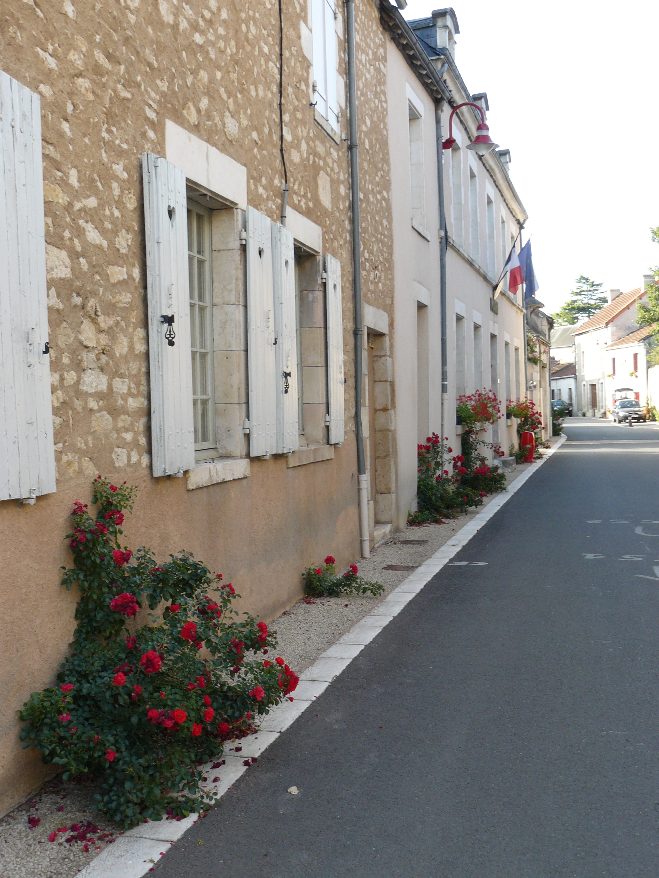 Commune de Saint-Germain 86. Rue de la Mairie : rue Léon Barbarin avec son fleurissement.